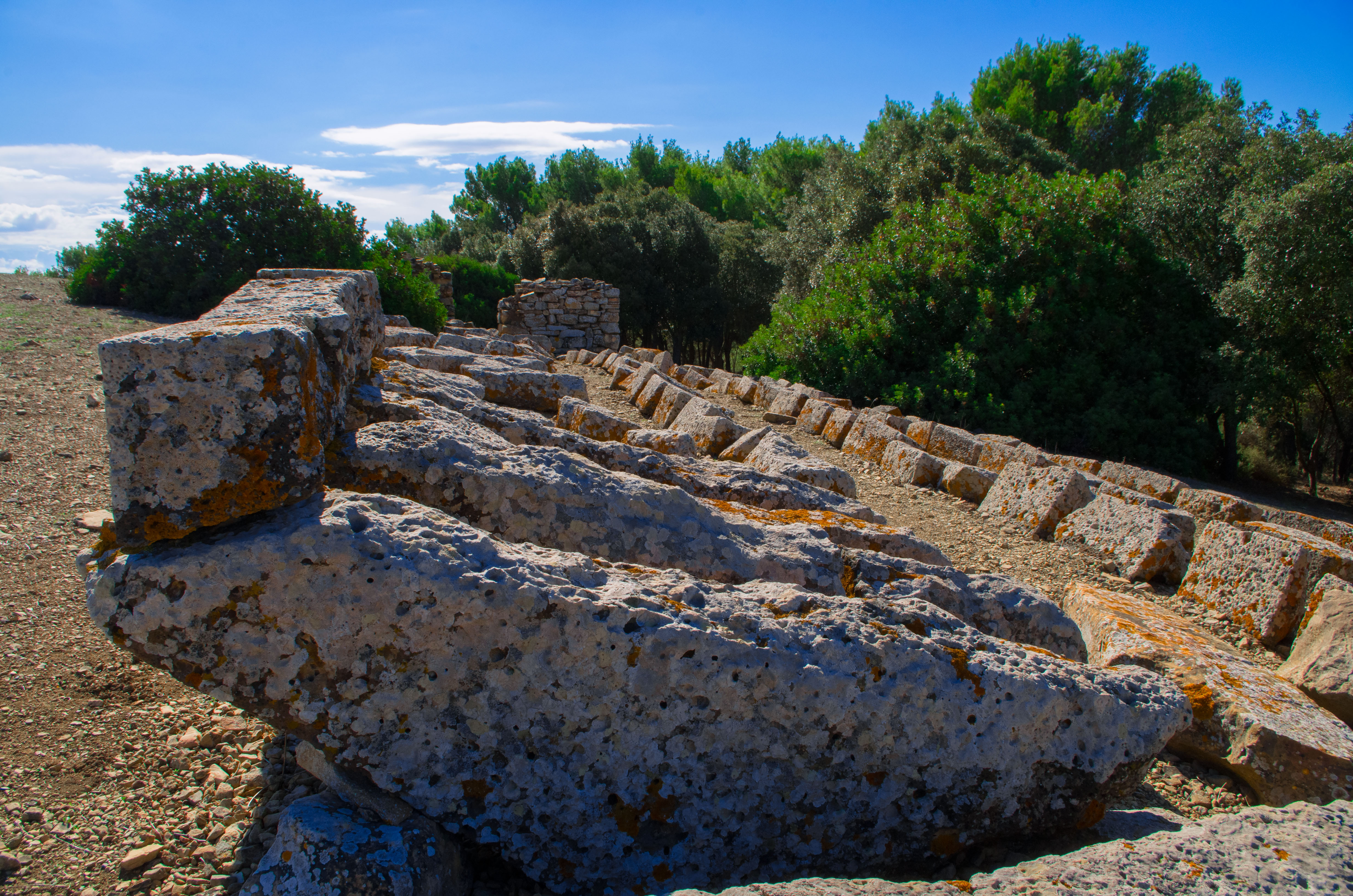 Nuraghe "Genna Maria" Parti di torri This is a photo of a monument which is part of cultural heritage of Italy.